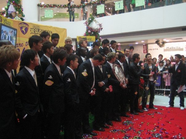 Pegasus in Yuen Long Plaza